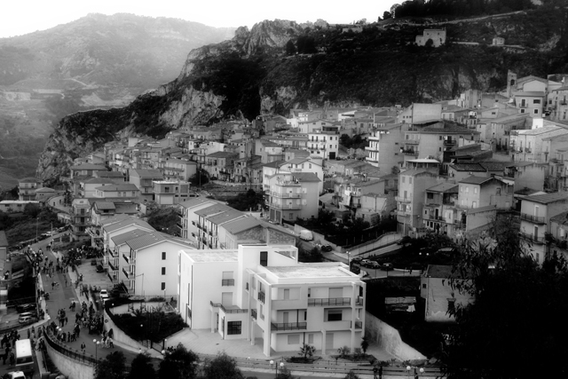 Veduta di Castronovo di Sicilia. Foto di Massimo Parisi - PALERMO